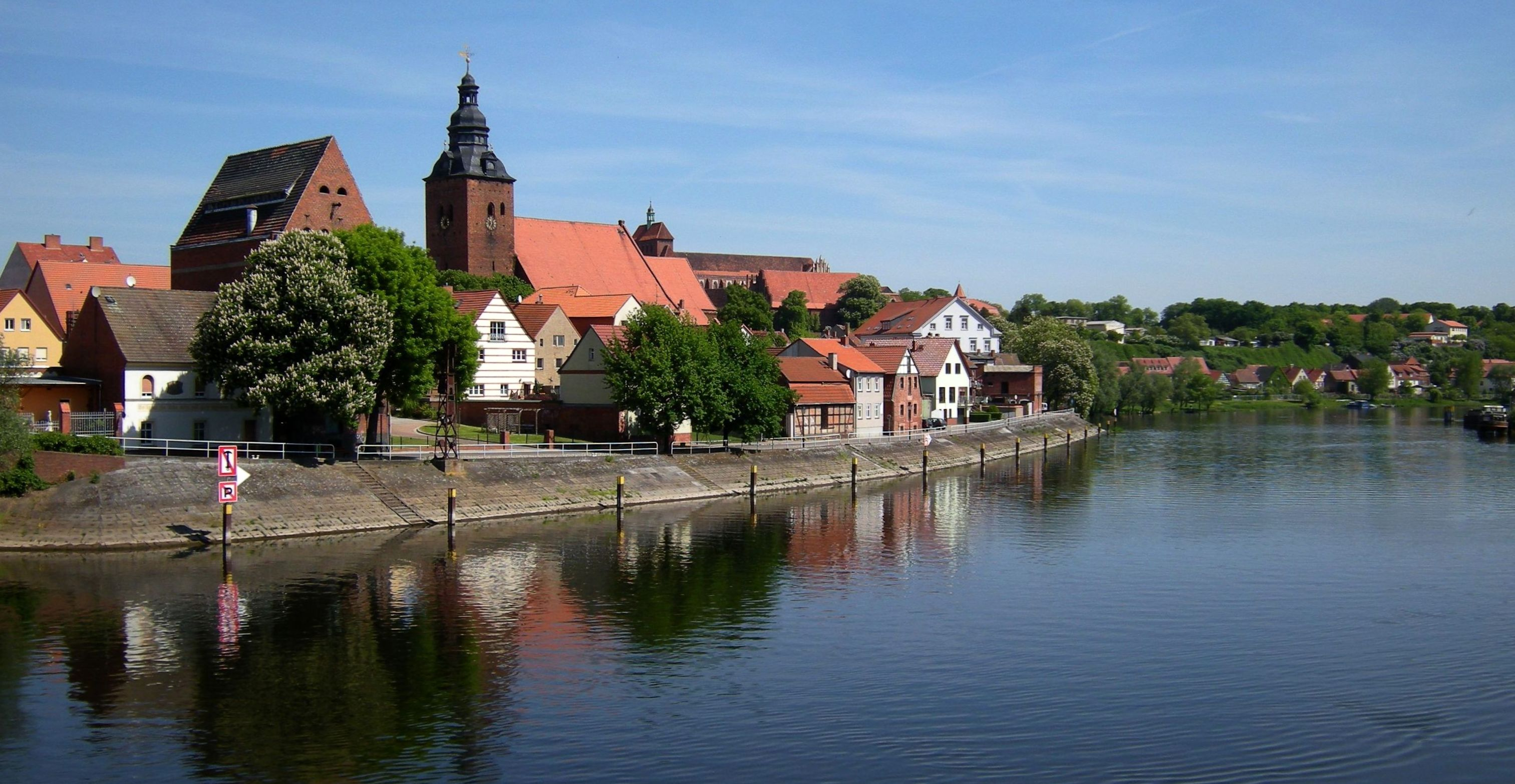 Havelberg-Stadtansicht mit Havel.jpg